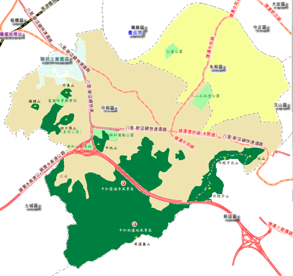 這是一張以生態旅遊角度為主的新北市中和區、永和區旅遊地圖。